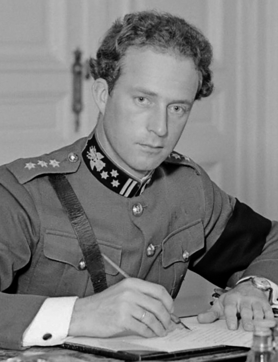 Koning Leopold III achter zijn bureau in het paleis te Laken 1934